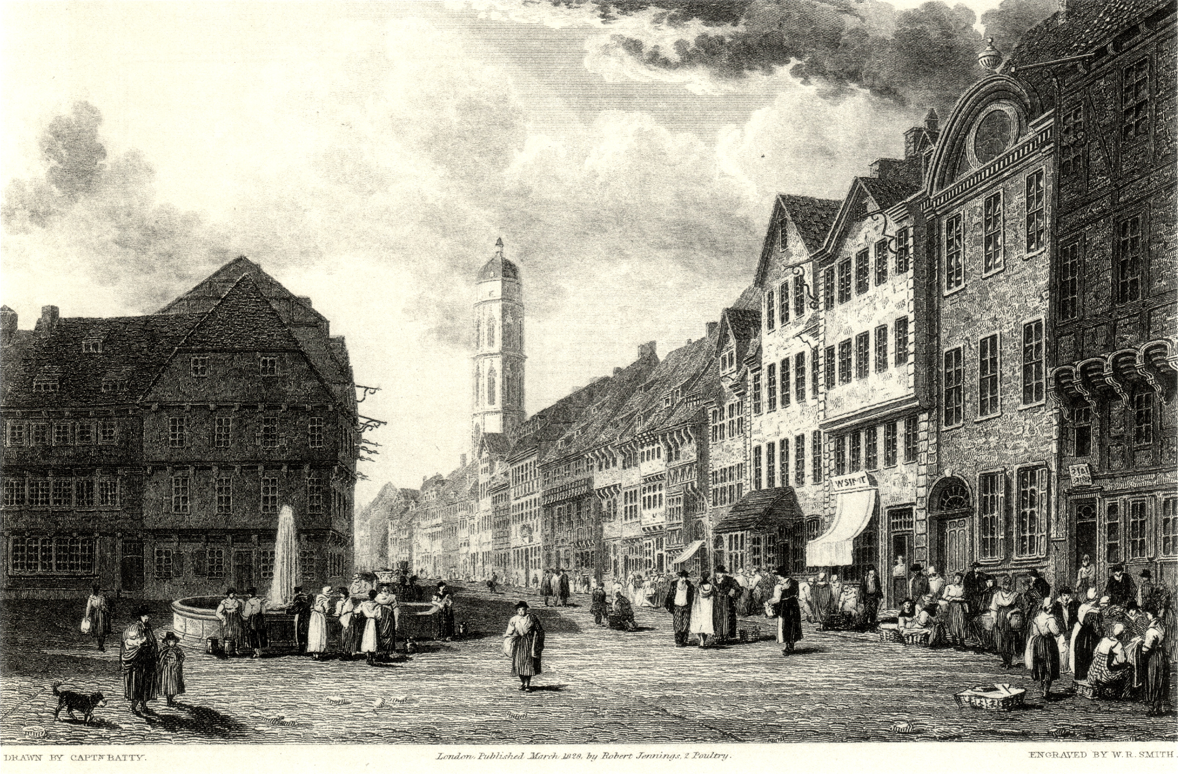 Blick über den alten Marktplatz von Göttingen mit dem Marktbrunnen nach Nordnordosten in die Weender Straße, im Hintergrund der Jakobikirchturm. Zeichnung von Robert Batty, Radierung von W. R. Smith